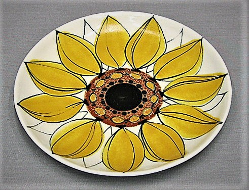 Arabian auringonkukkaa esittävä Aurinkoruusu-sarjan lautanen